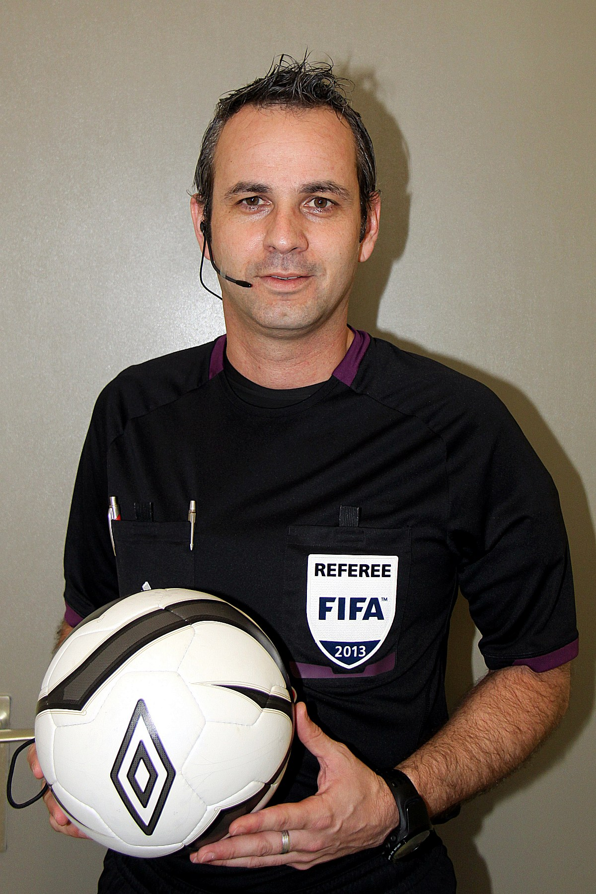 Meisterschaftsspiel der österreichischen Bundesliga: SV Mattersburg gegen FC Wacker Innsbruck am 7. April 2013 (0:0)] im Mattersburger Pappelstadion.] - Das Foto zeigt Schiedsrichter Rene Eisner.